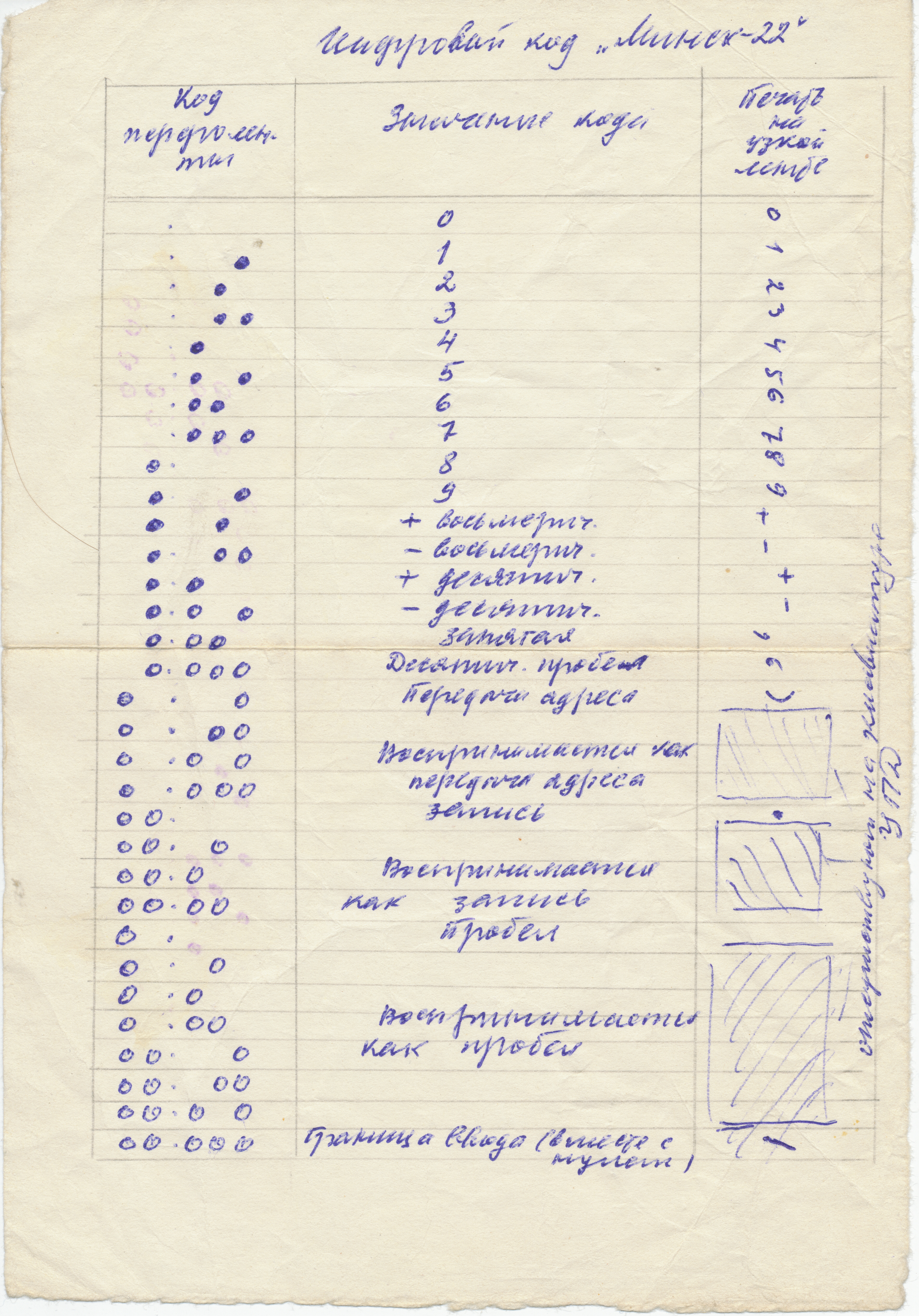 Памятка, сделанная математиком, гидрологом и программистом Казаковым Владимиром Михайловичем, сотрудником Вычислительного центра института «Энергосетьпроект» в 1962-1972 гг. Цифровой (машинный) код «Минск-22»: Код перфоленты. Значение кода. Печать на узкой ленте.